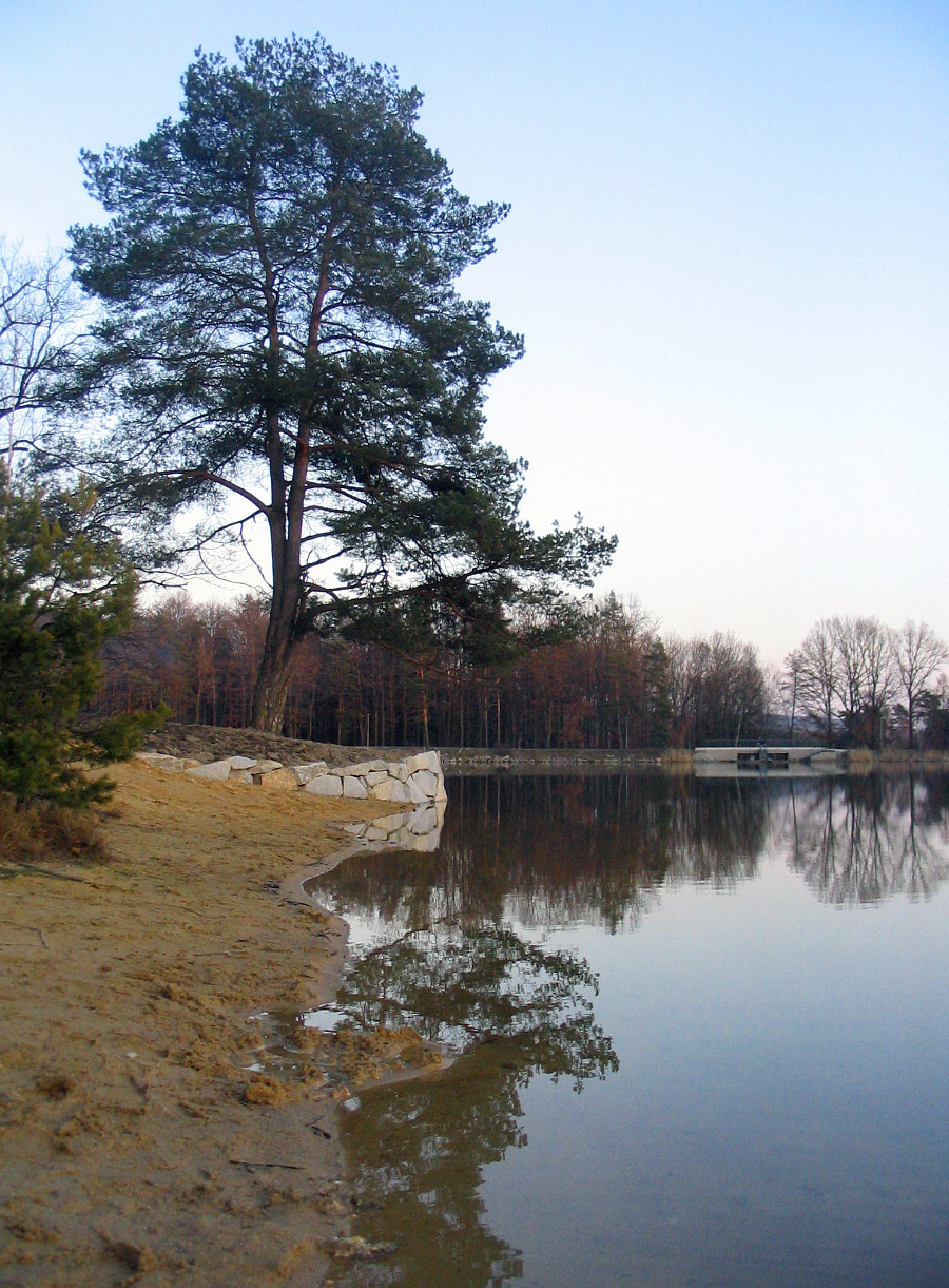 Písčité pláže a regulované úseky severního břehu Senecký rybník